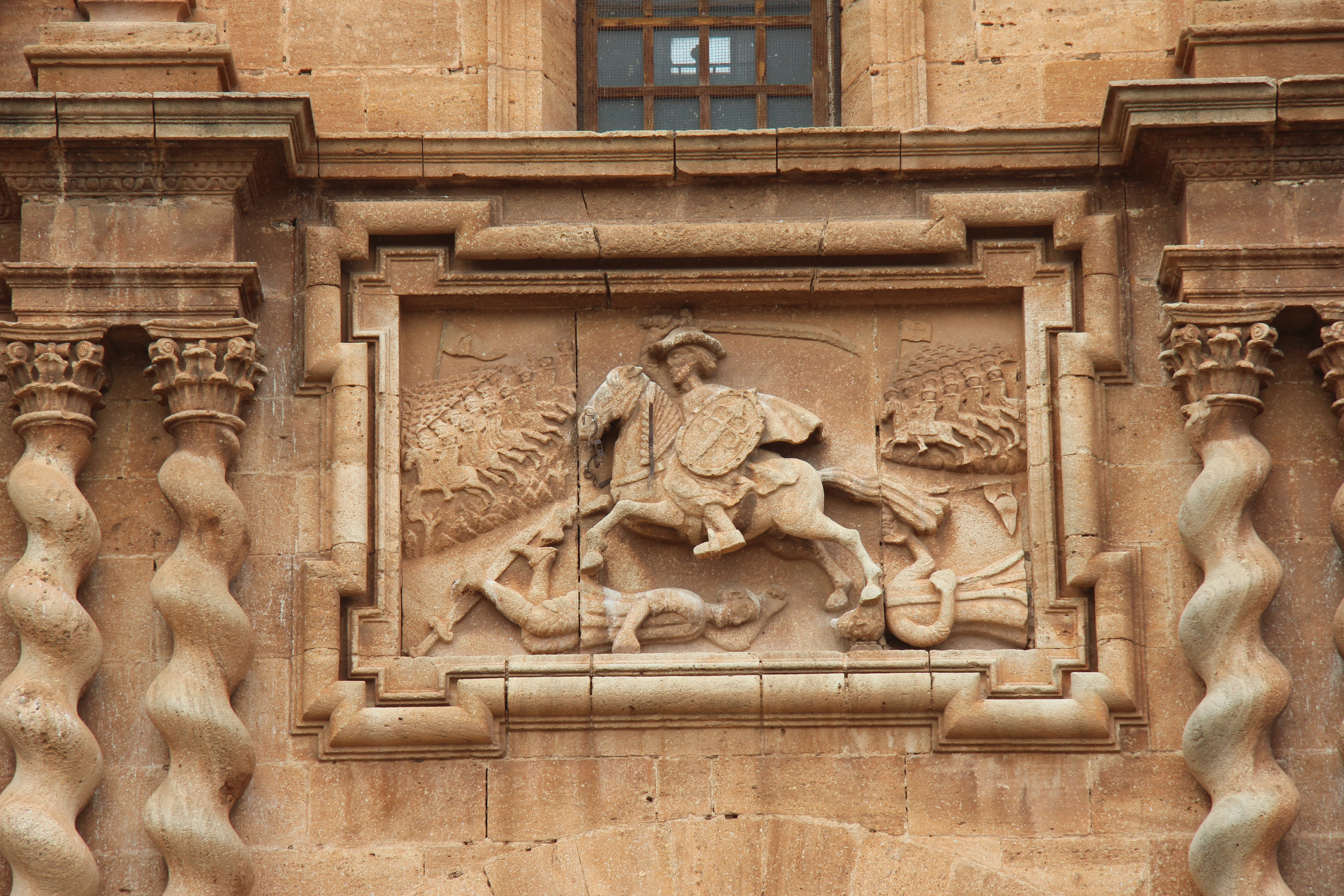 San Carlos del Valle is een gemeente in de Spaanse provincie Ciudad Real in de regio Castilië-La Mancha. Opname uit maart 2017.